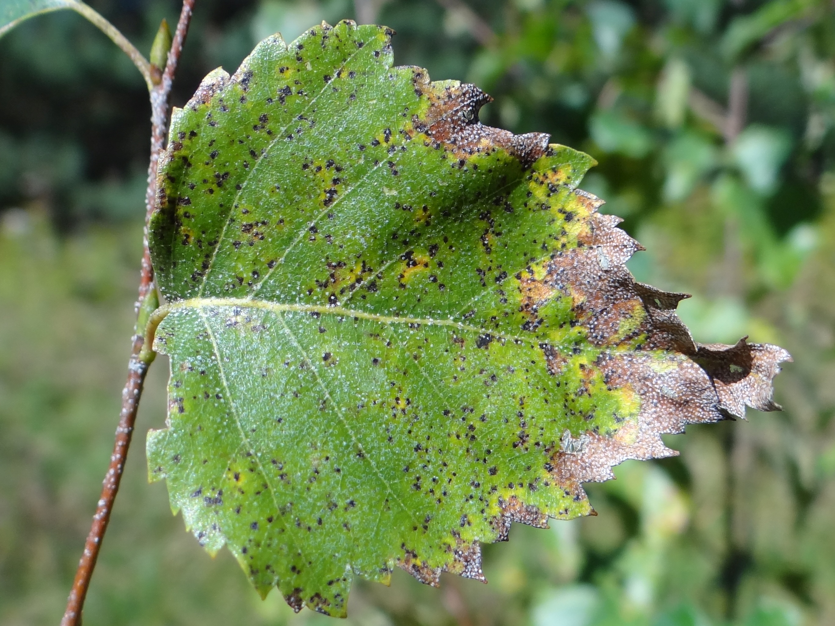 Marssonina betulae on Betula verrucosa. Location: Poland, Beskid Wyspowy, Kobylica (Kiczora)